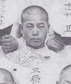 三原元一海軍中佐